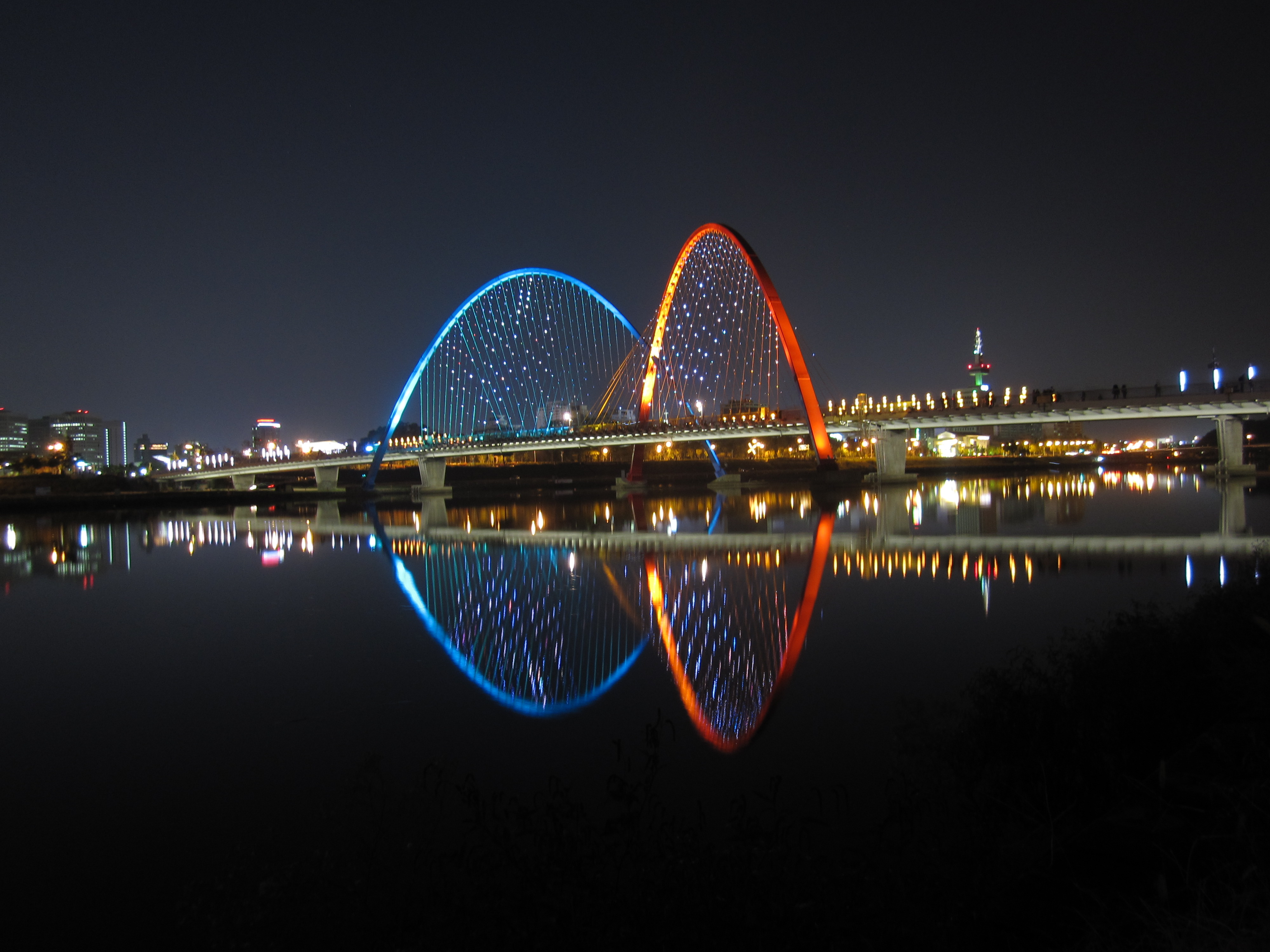 Expo-Bridge at night